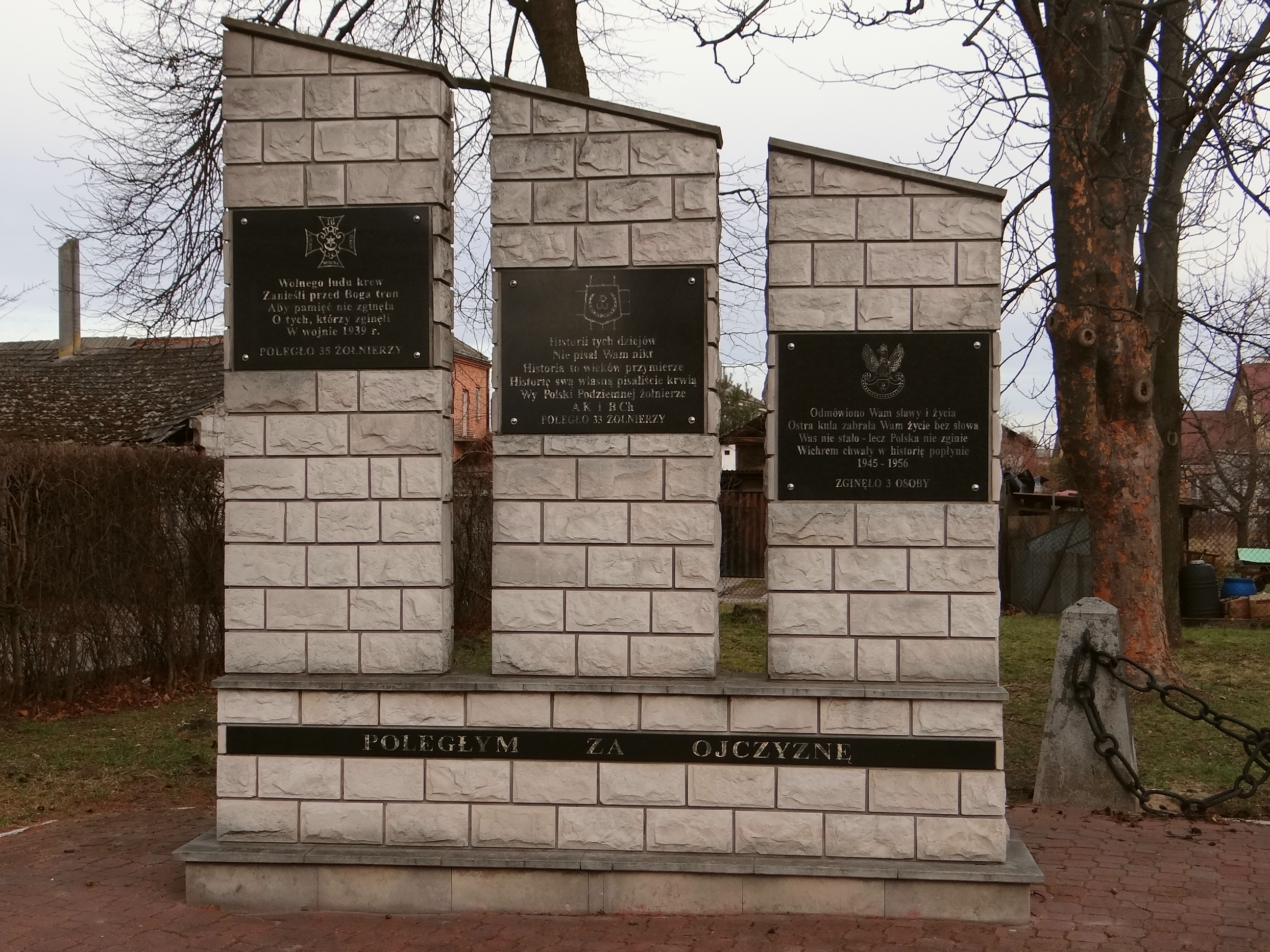 Fragment pomnika żołnierzy polskich zamordowanych w Szczucinie